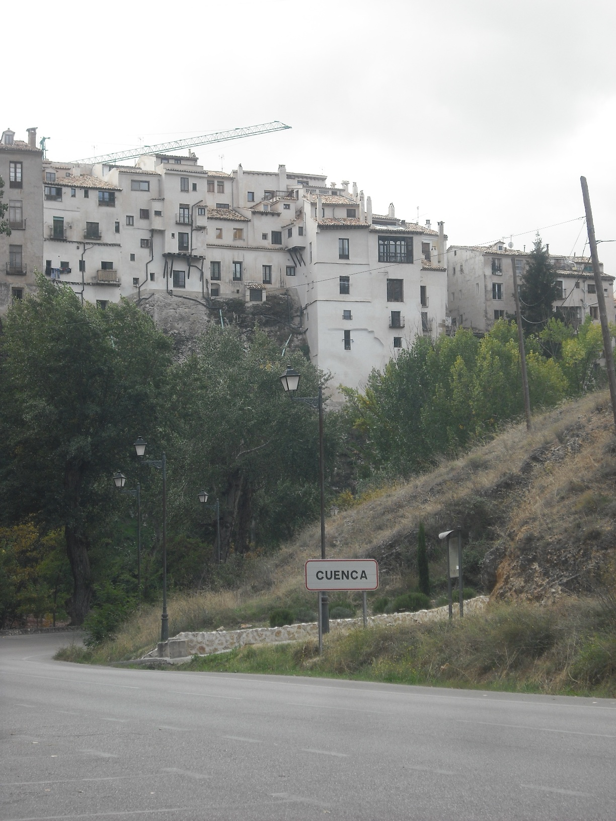 Entrada a Cuenca.